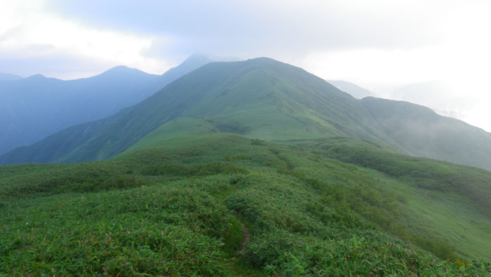 丹後山山頂より